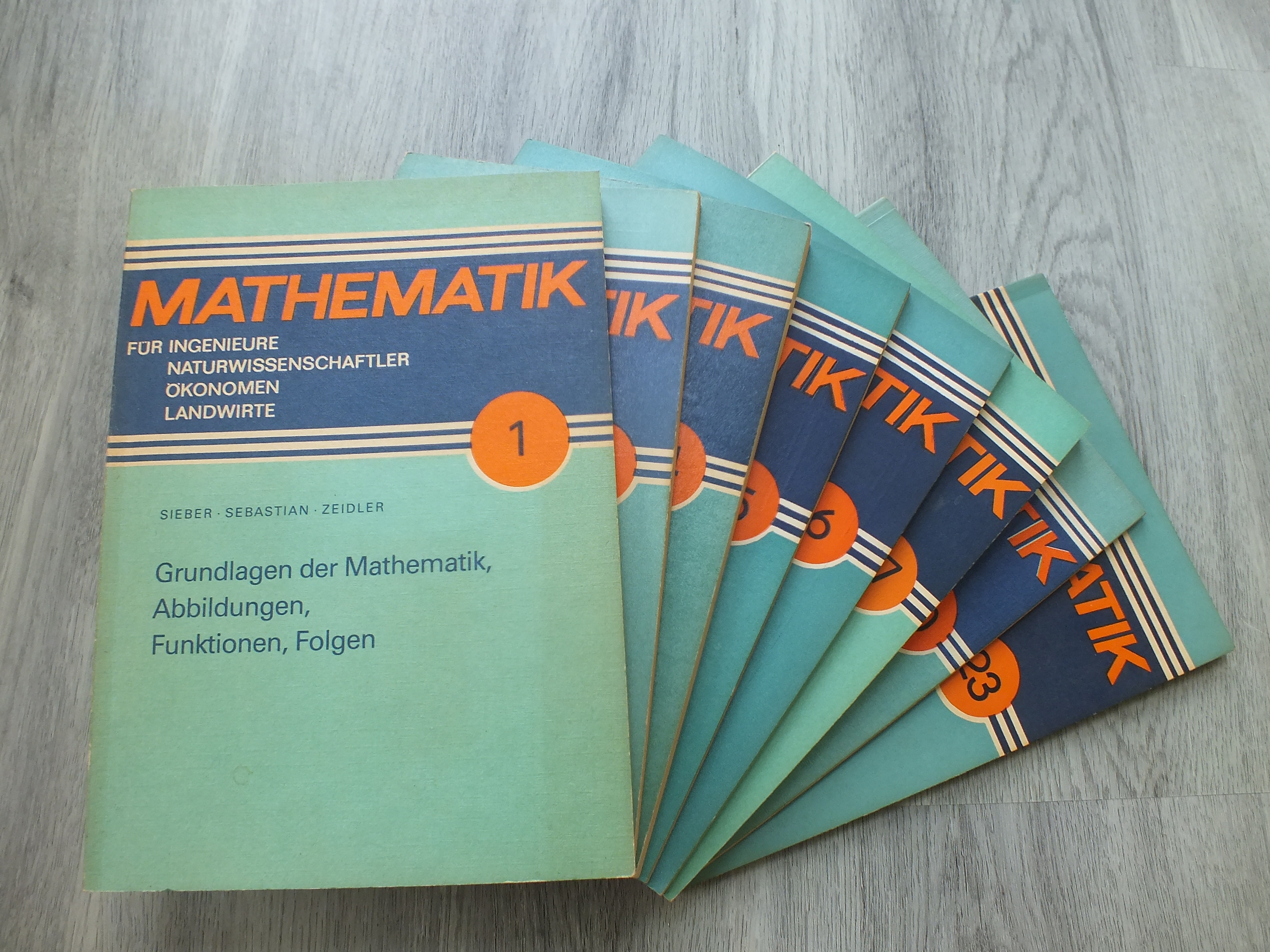 siehe Medienlegende